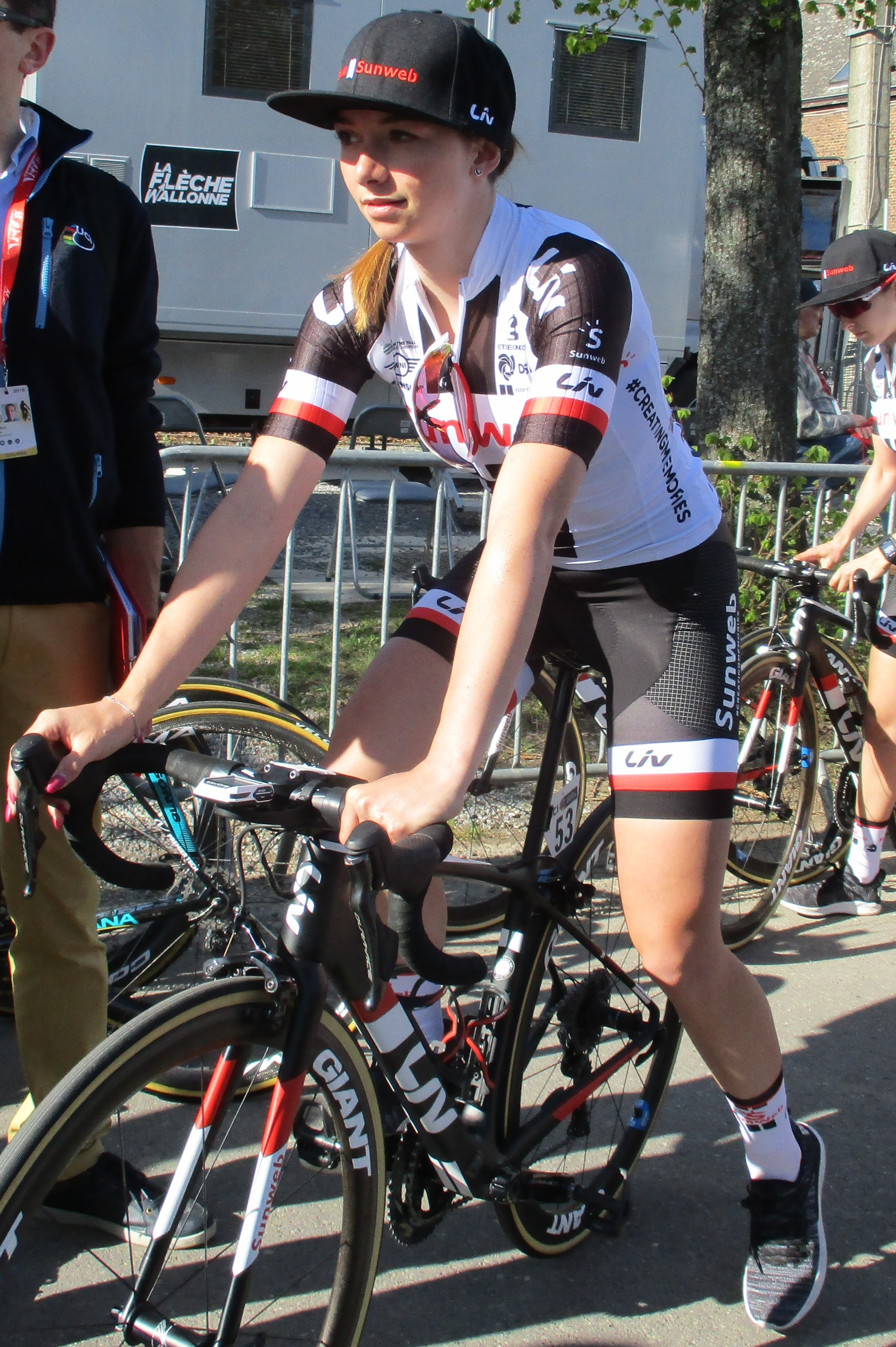 Start van de Waalse Pijl 2018 op de Mur van Huy.